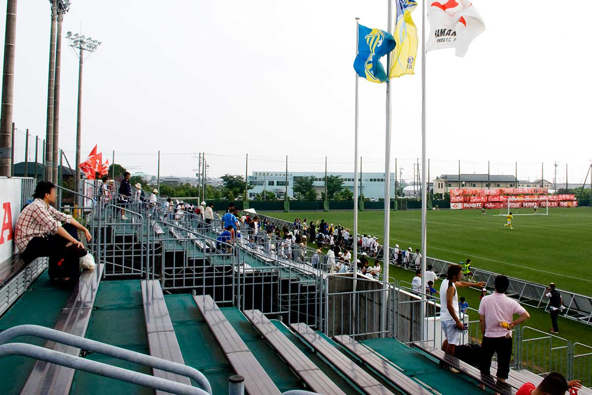 ホンダ都田サッカー場のバックスタンドの様子 正面の白い建物はKGK HEXA事業部。ここの駐車場が観戦者用駐車場として使用される